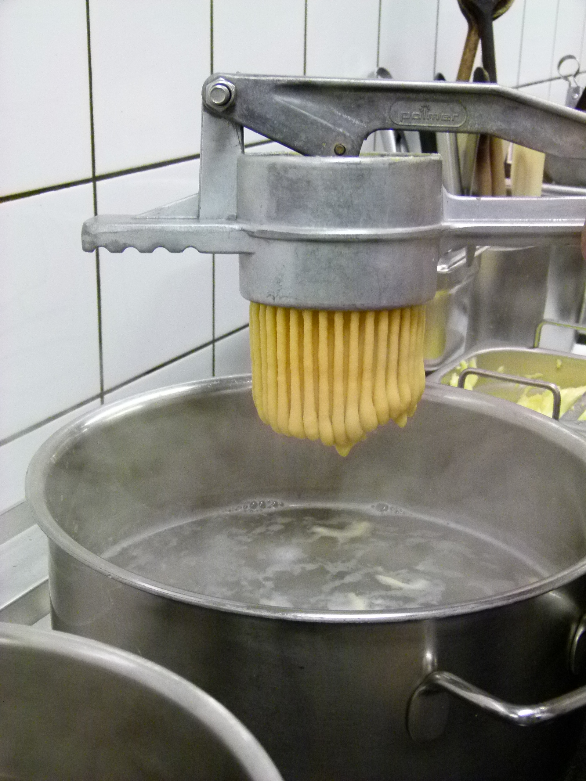 Spätzlepresse